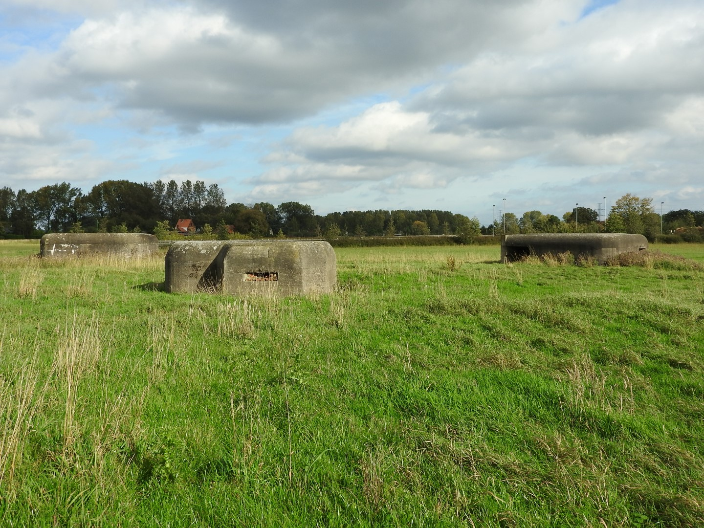 Beveren Nerenhoek bunkers